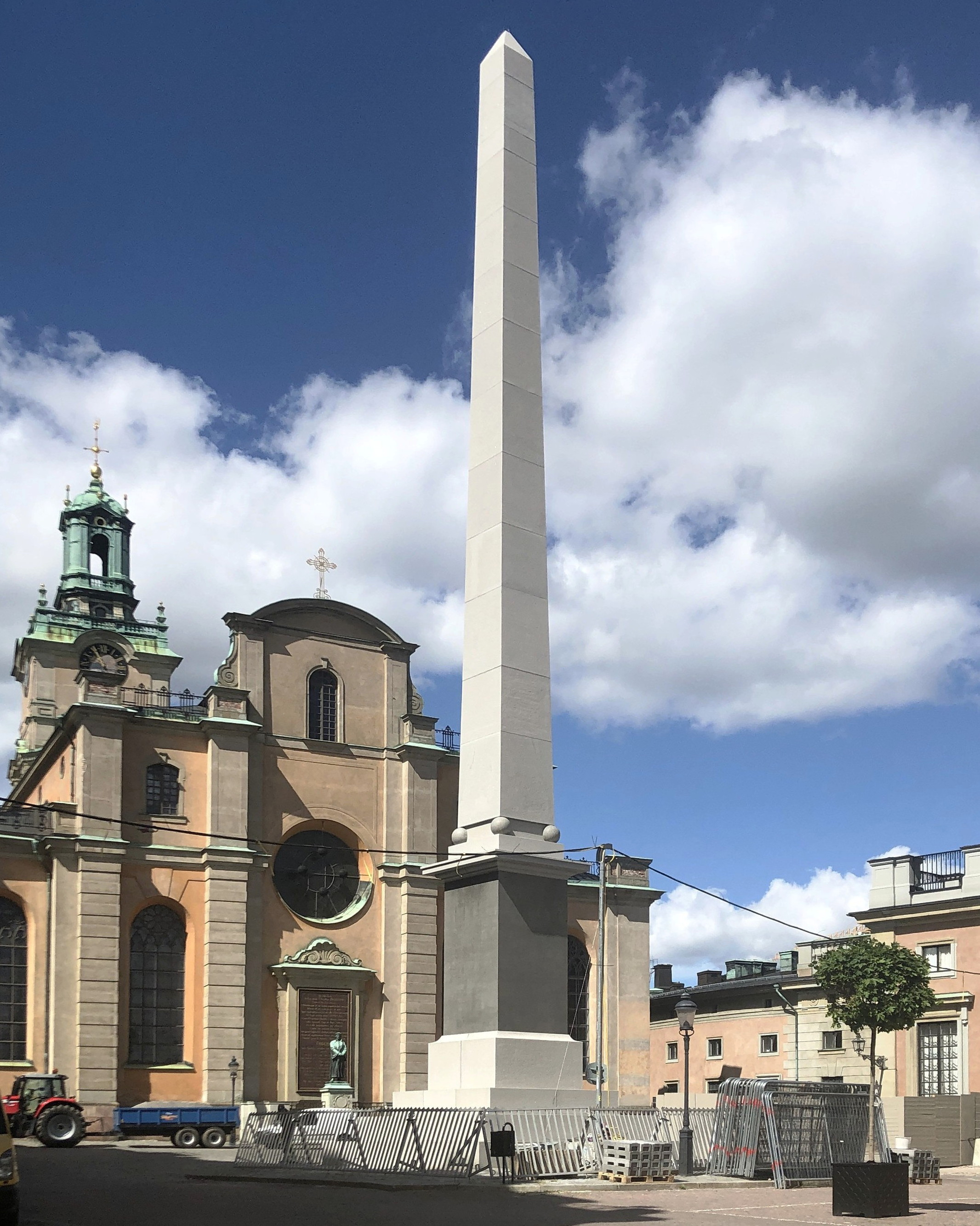 Obelisken på Slottsbacken, tagen den 3 juli 2020.